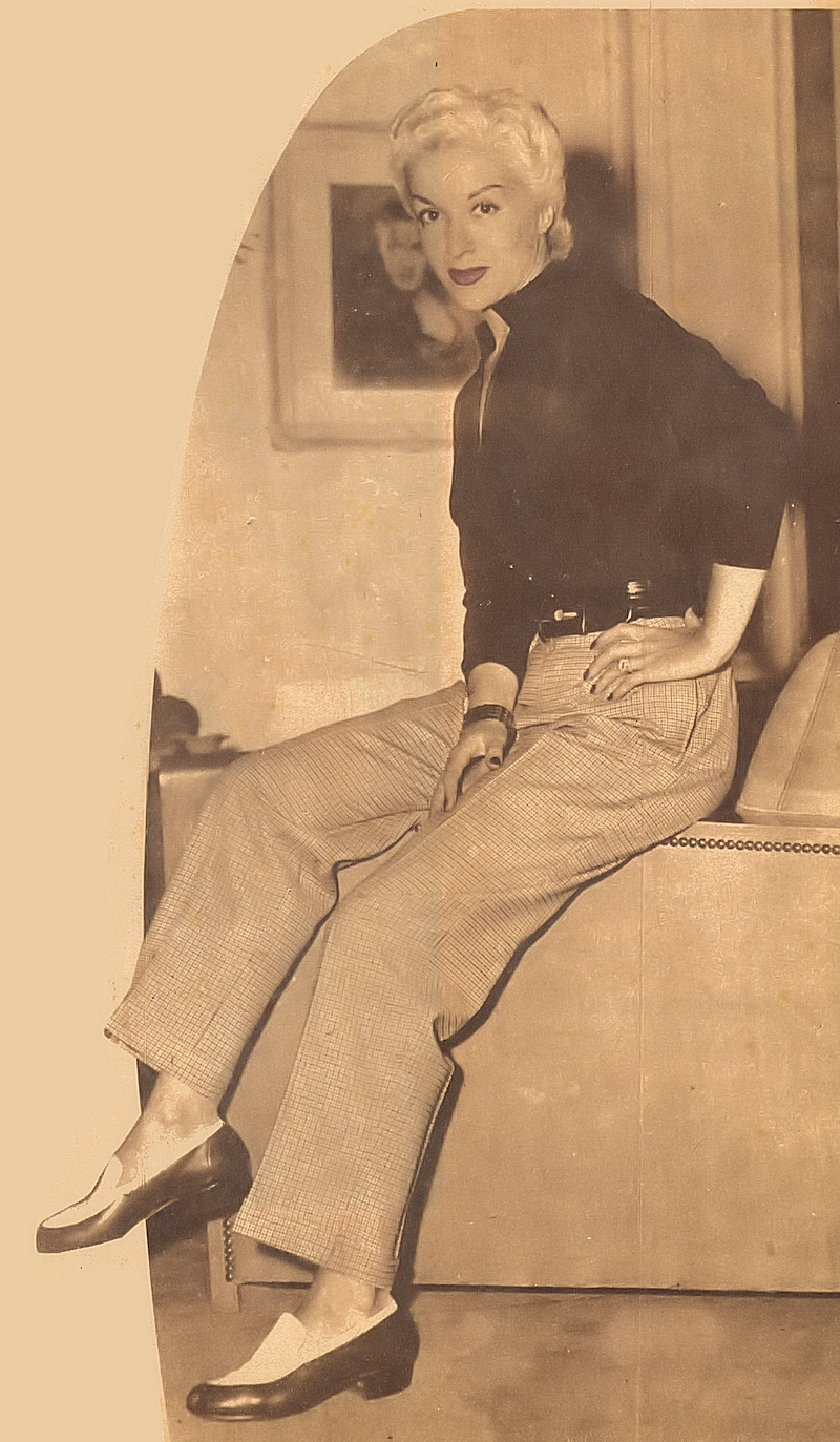 Elina Colomer, Revista Radiolandia, 1953